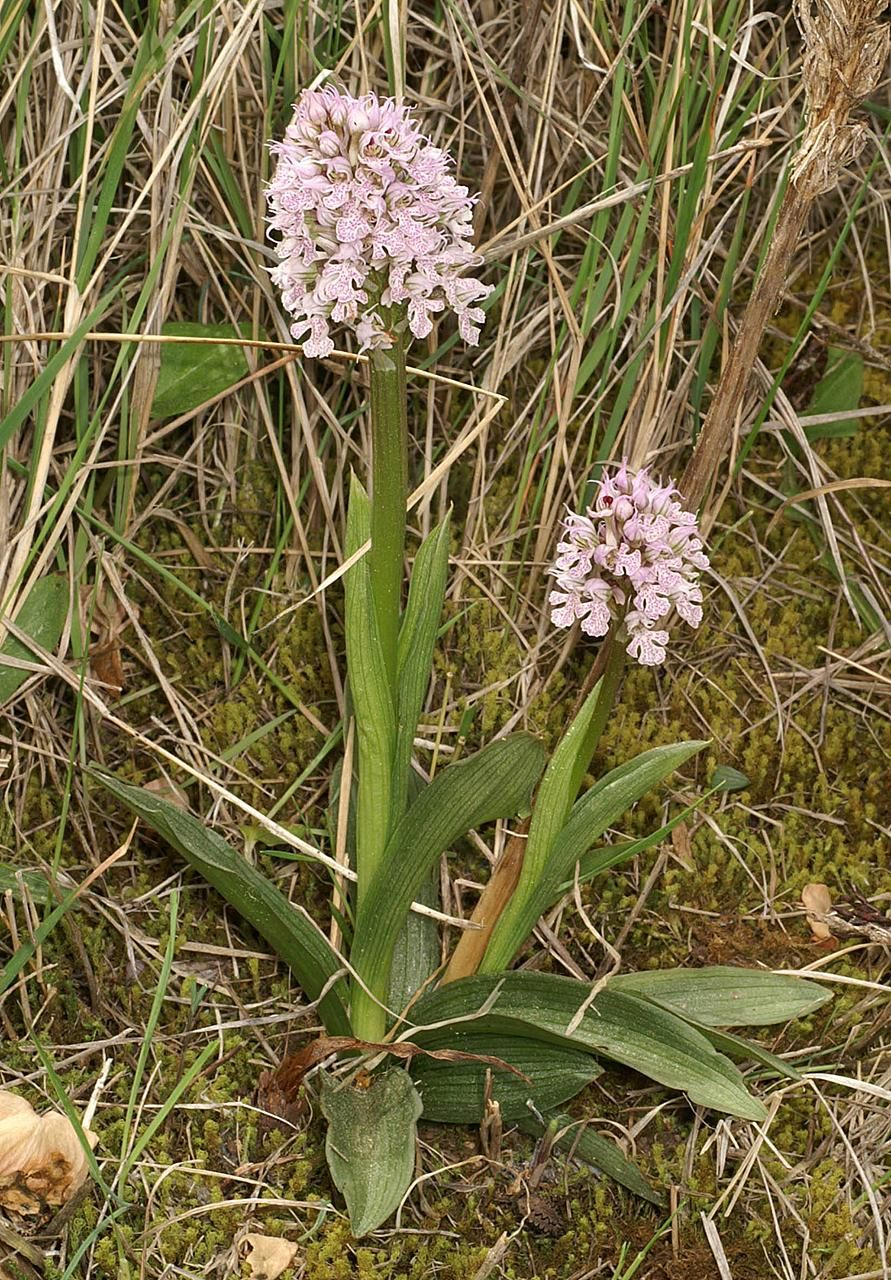 Neotinea tridentata subsp. conica